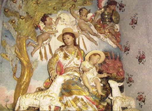 Divina